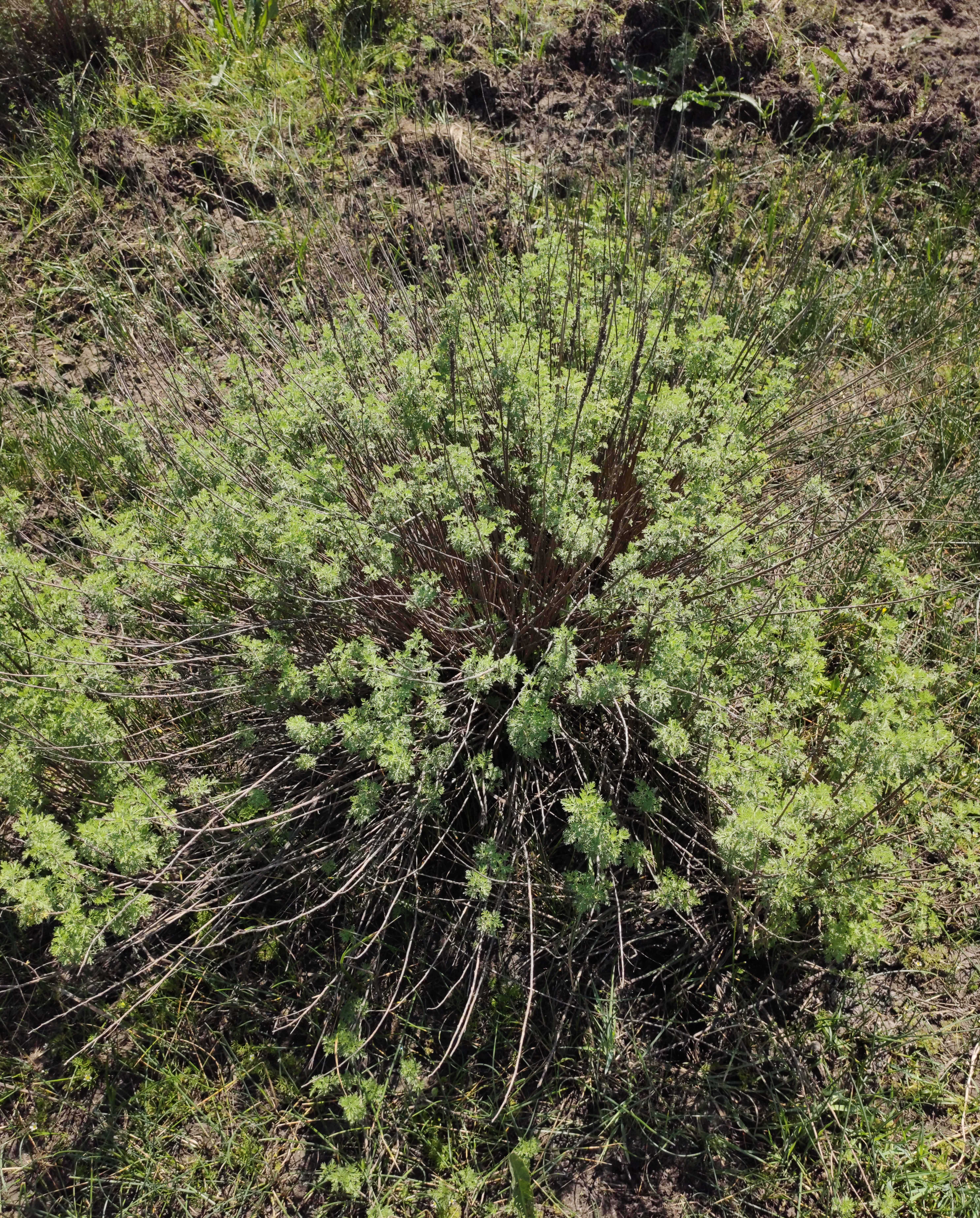 Lac Redon, Var, France